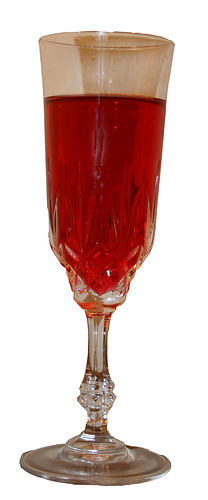 Wine in a Glass